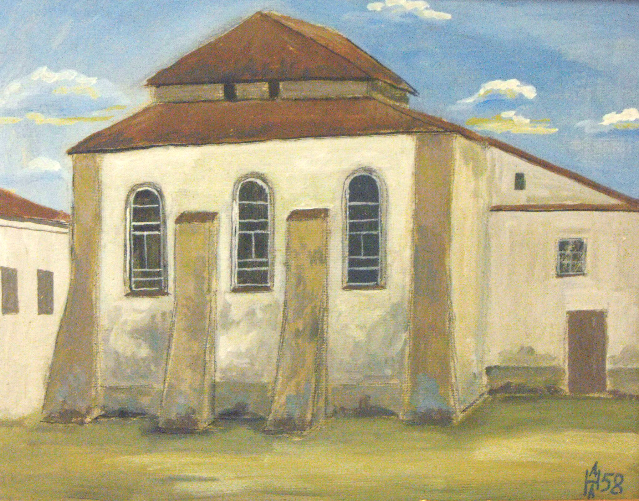 Несвиж, синагога, 1958 год. Сделана в 1967 году по акварели 1958 года. Яичная темпера. Художник - Анатолий Наливаев.